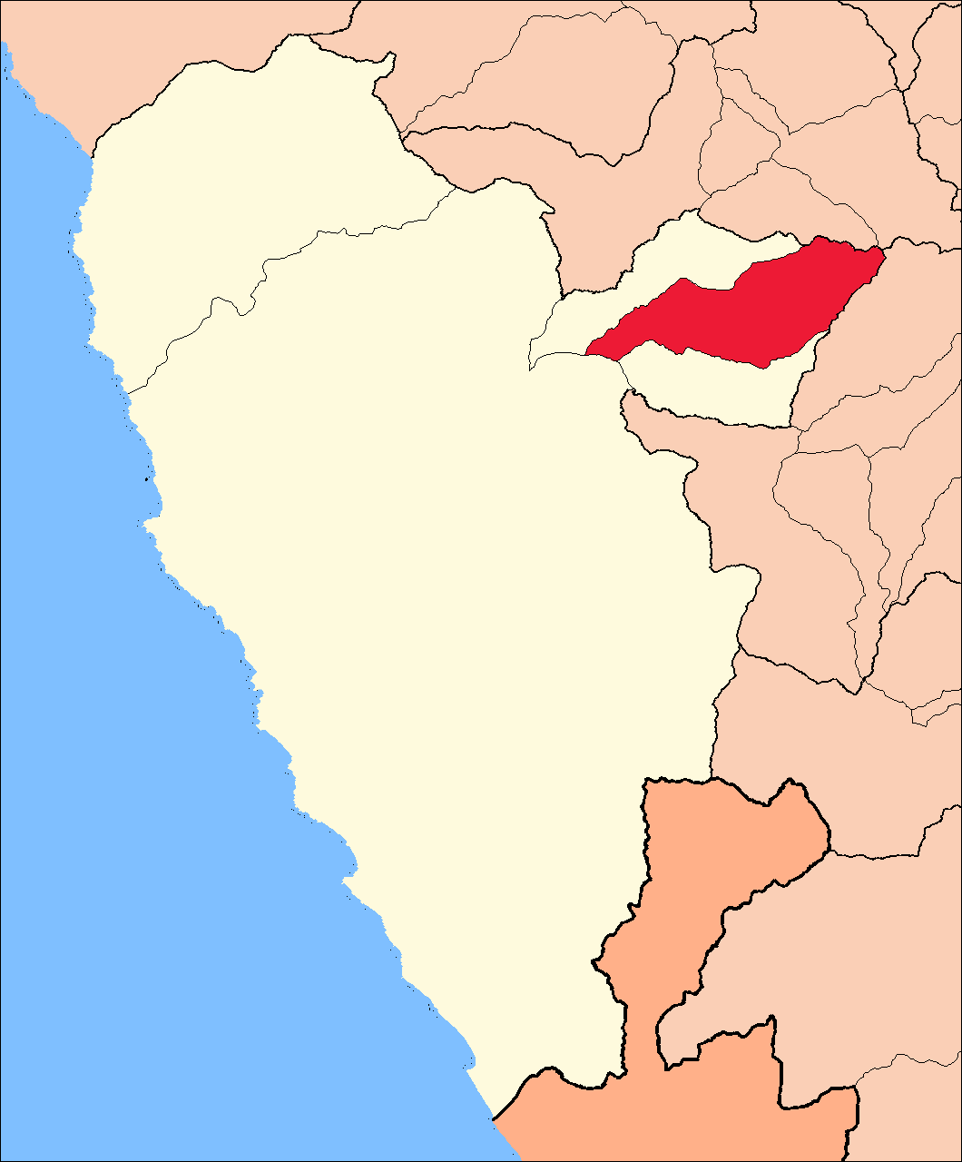 Ubicación del área del distrito de Malvas.